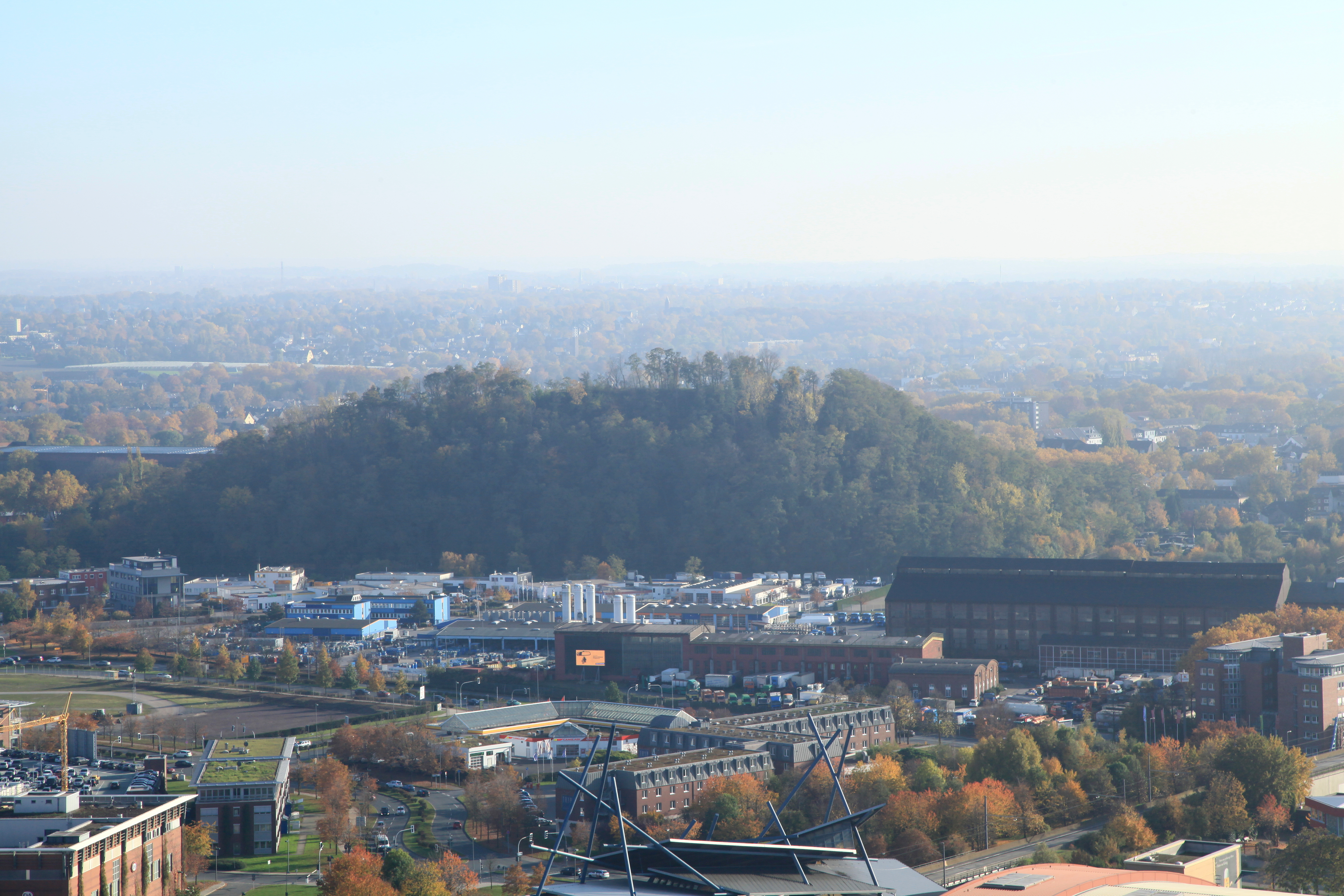 Blick vom Gasometer zur Neuen Mitte vor der Knappenhalde in Oberhausen